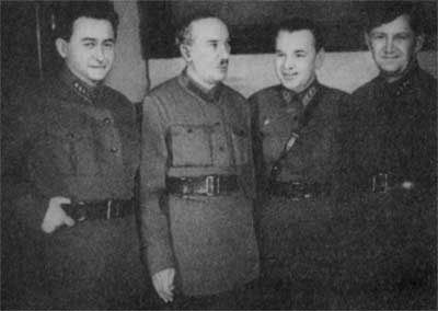 Руководители ОГПУ - делегаты XVII съезда ВКП(б): Я.С.Агранов, Г.Г.Ягода, неизвестный и С.Ф.Реденс.